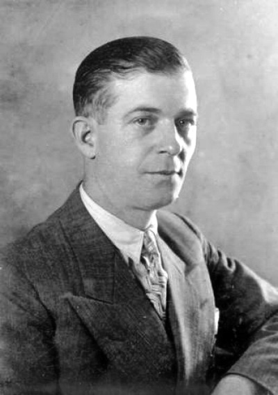 Ramón Suárez Picallo, fotografía en Vida Gallega 1932